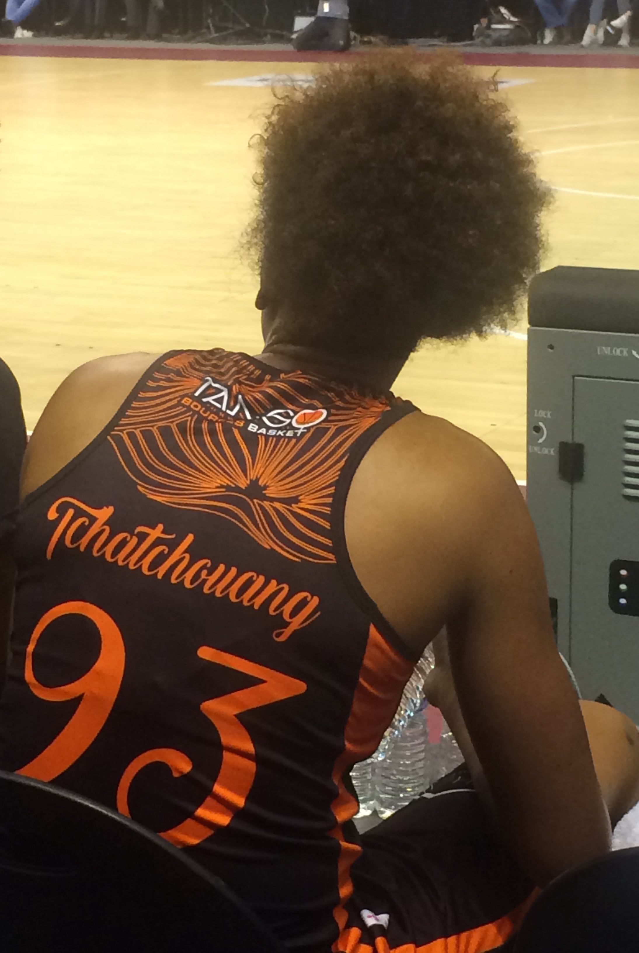 La joueuse française de basket-ball Diandra Tchatchouang sur le banc de Bourges lors de l'Open LFB 2016.